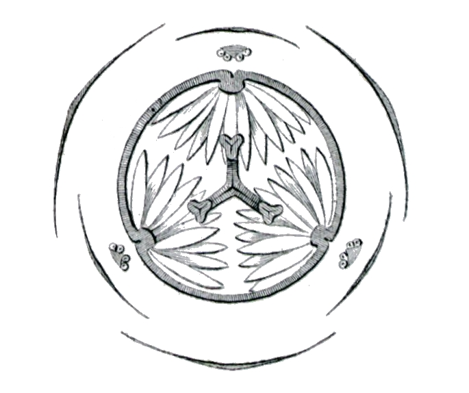 Blüte Dictyostega_.jpg